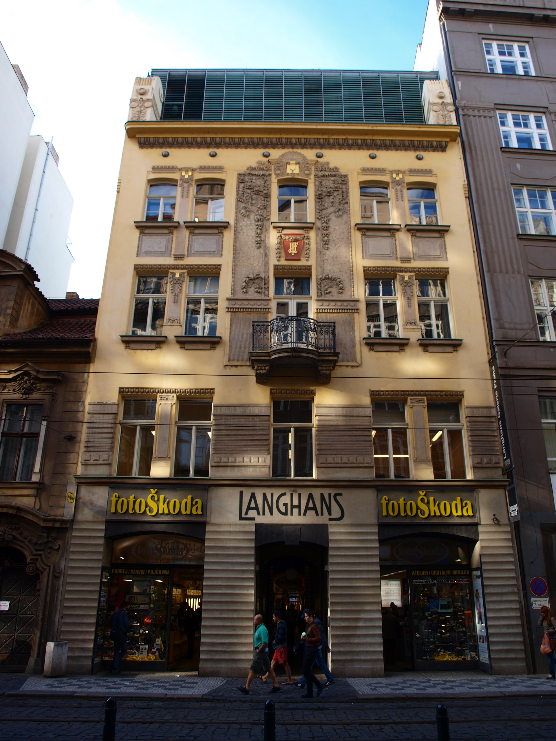 Palác Langhans, Praha